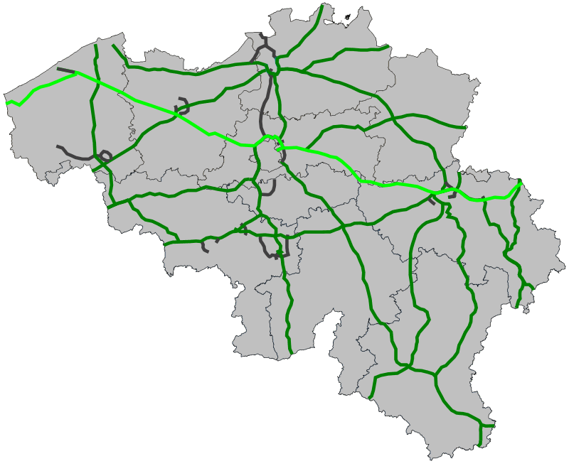 Traject van de Europese weg 40 door België